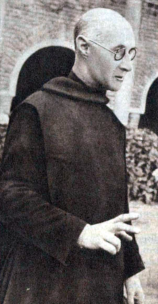 Fray Pedro Subercaseaux